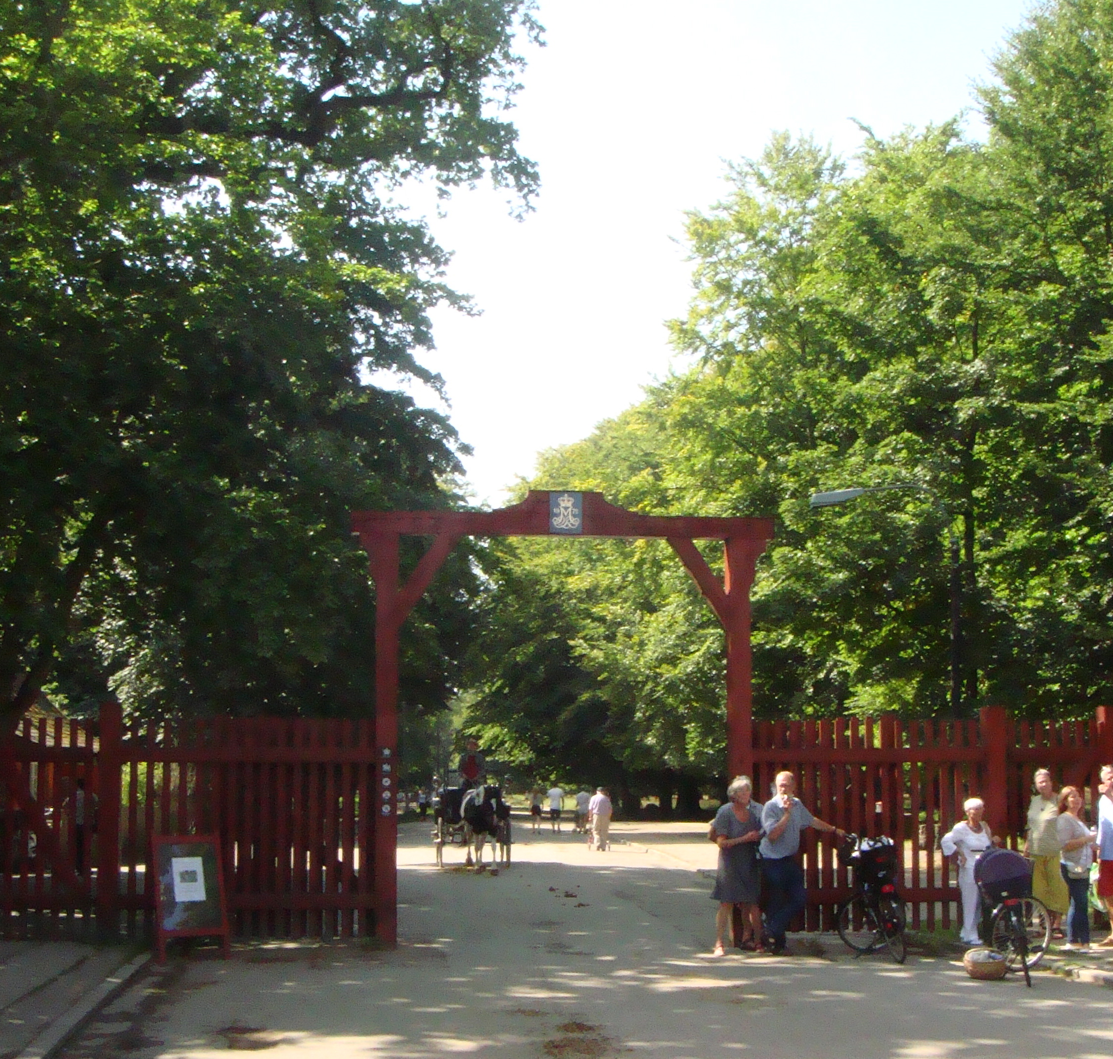 De røde porte til Dyrehaven ved Klampenborg. The red gates at the Deer Park near Klampenborg.